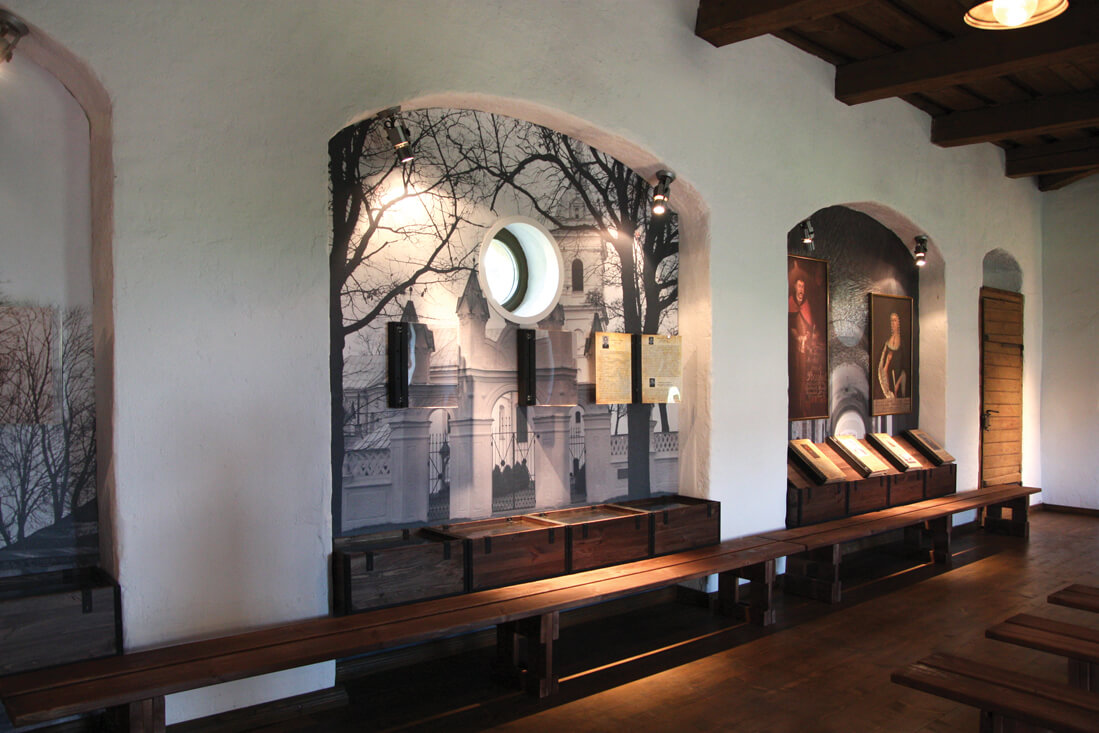 Vienuolyno svirno vidus po restauracijos